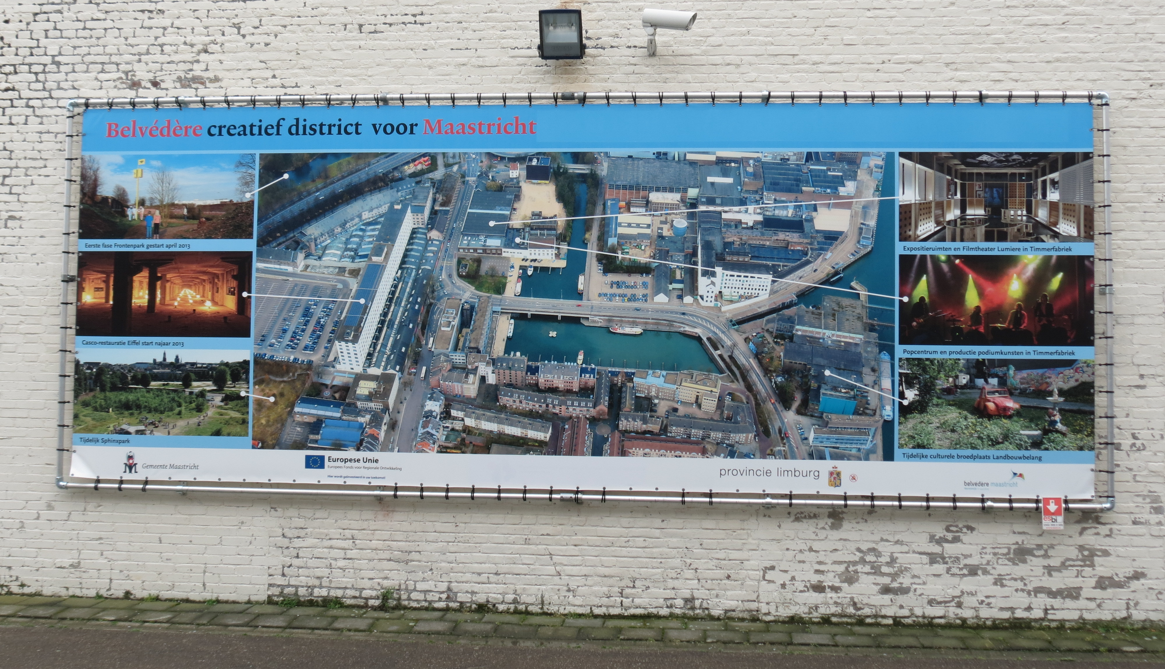 Aan de zuidgevel van het industriecomplex bevindt zich dit overzicht van het project Belverdere.